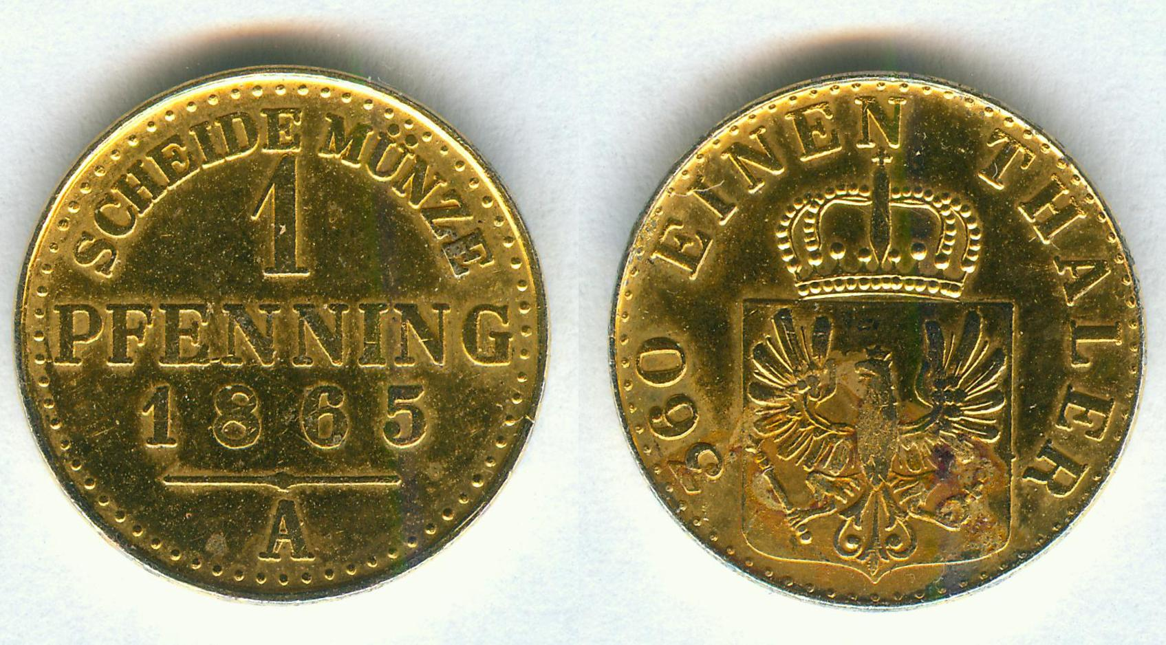 Scheidemünze 1 Pfennig 1865